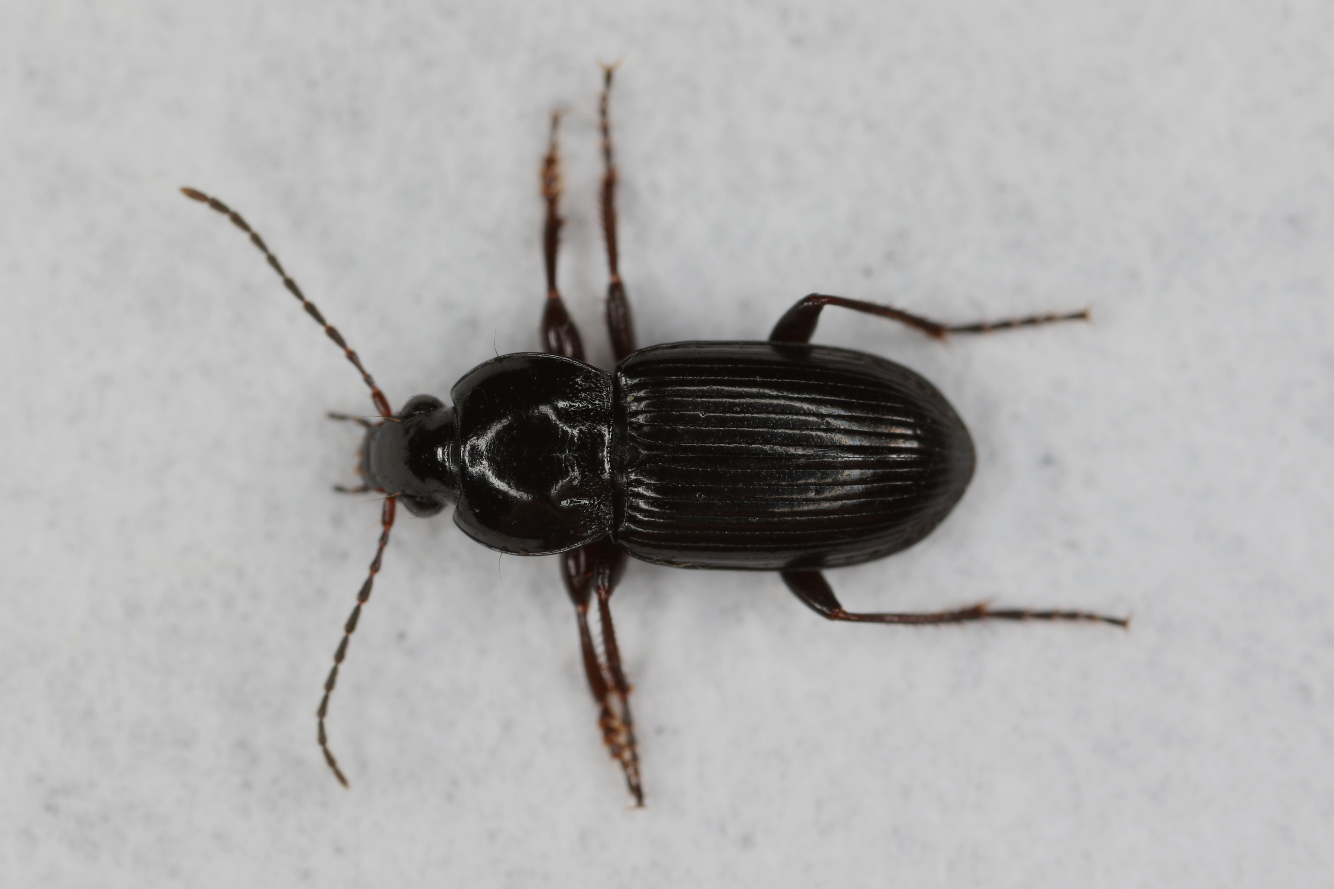 Pterostichus vernalis (Panzer, 1795), Søborg, Denmark, 16 April 2016